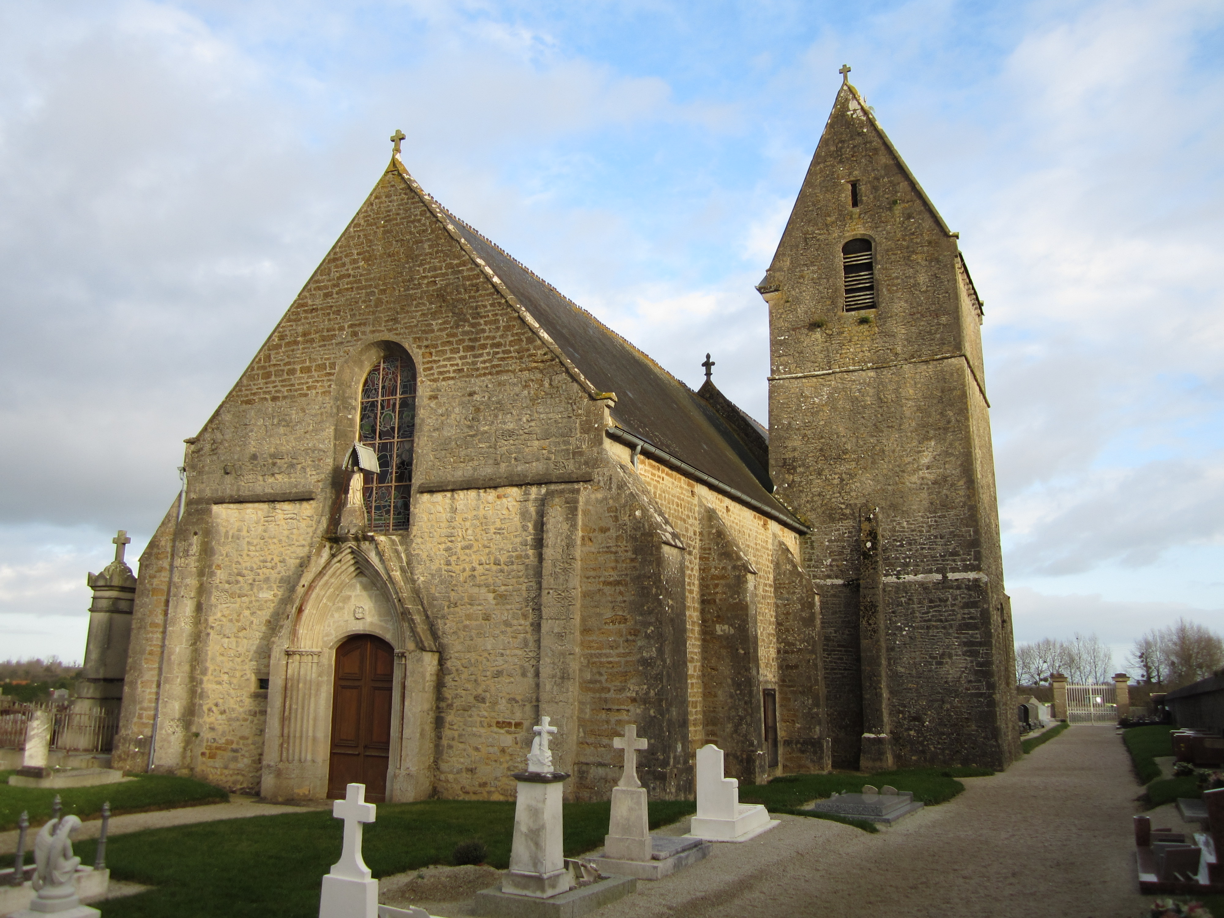 Église Saint-Gilles de Ravenoville